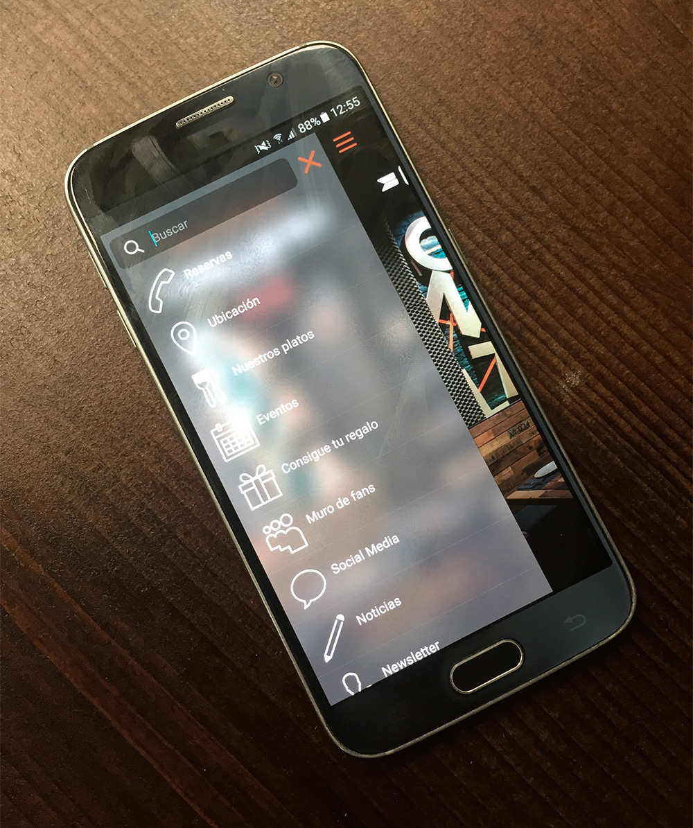 Visualización de una Web App en Android.